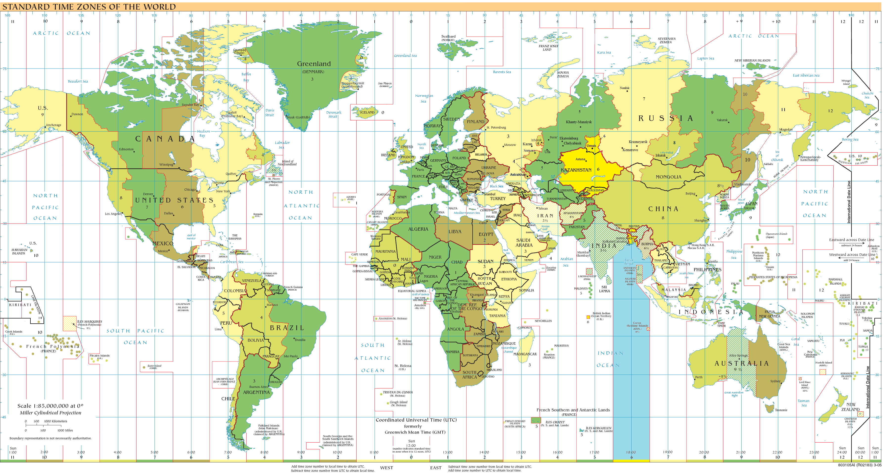 Timezones 2011 UTC+6